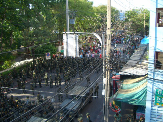 Red shirt protesters confront the military on Pracha Songkhro road just off Din Daeng road, Bangkok. About 1,5 kilometers from my home ...